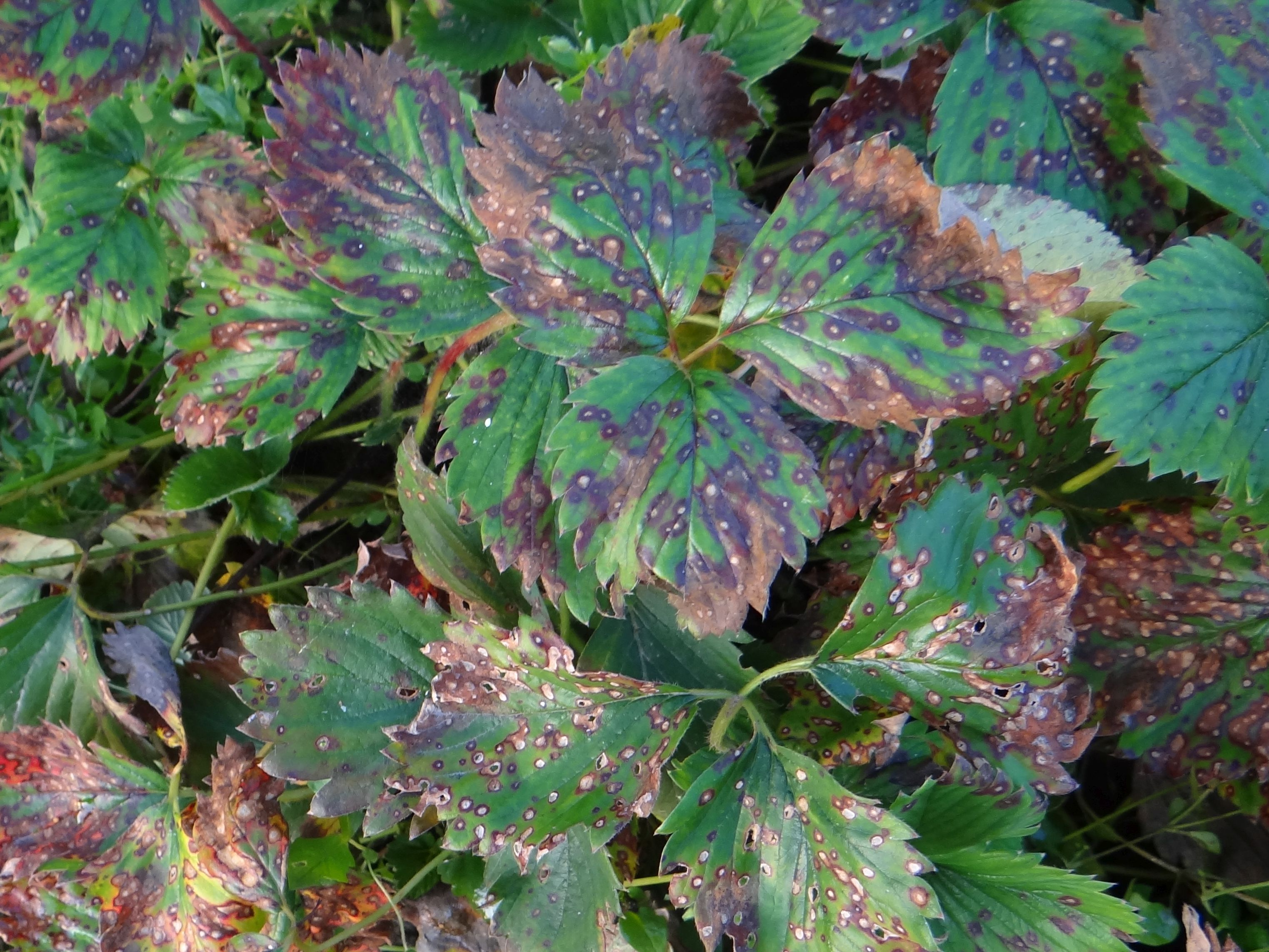 Mycosphaerella fragariae on Fragaria